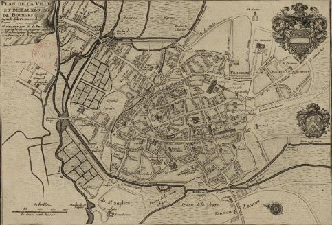 Plan ville de la ville de Bourges et le rempart gallo-romain exécuté par Nicolas de Fer en 1703.